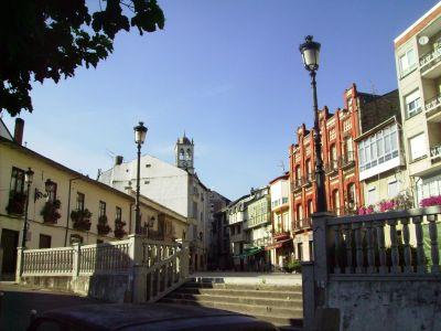 Plaza de San Mauro o del casino en el casco histórico de O Barco.